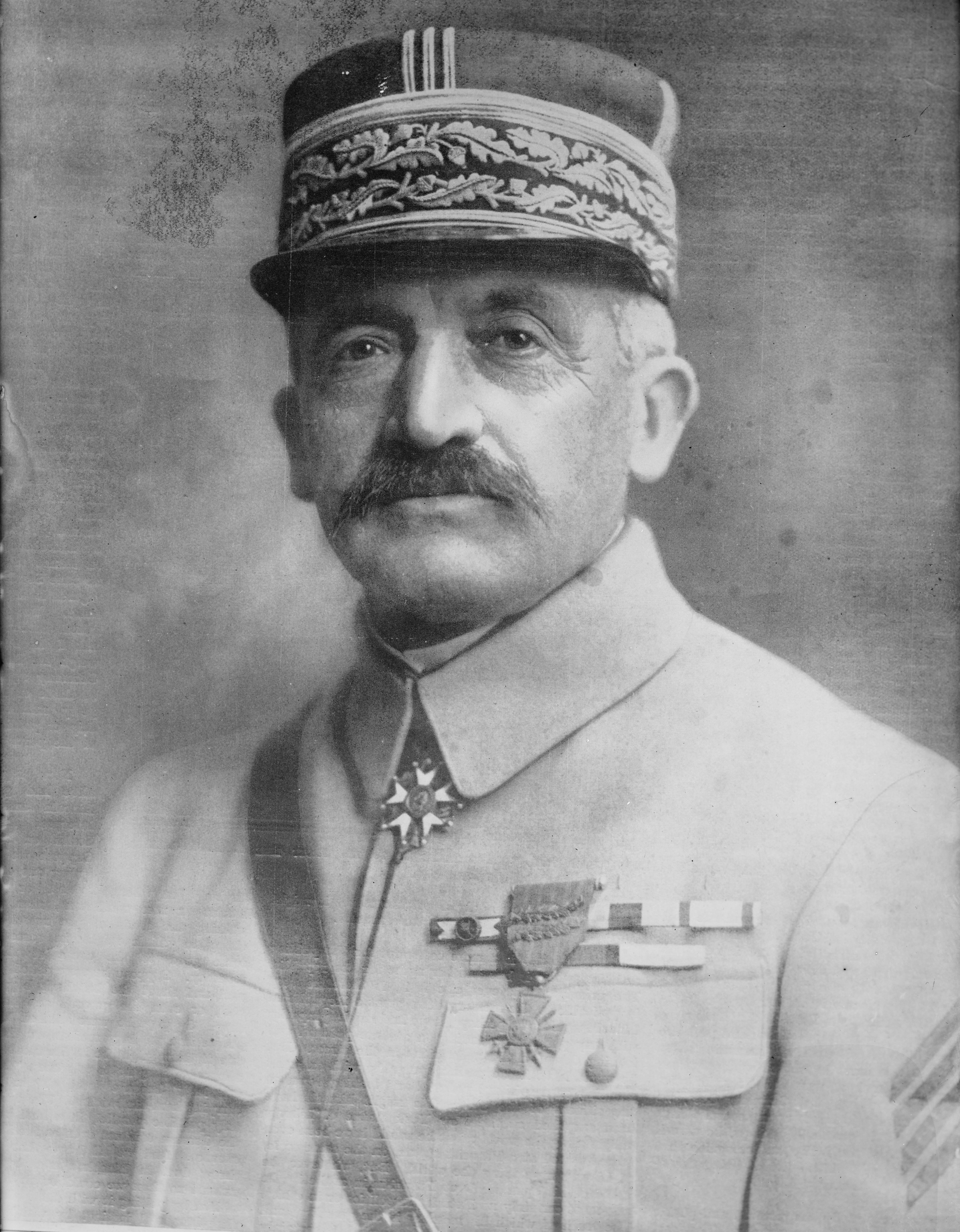 Géneral Paul Maistre